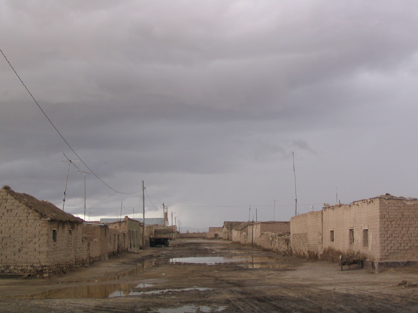 Vila de Colchani na Bolivia